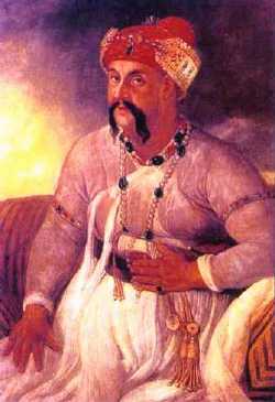 Asaf-ud-Daula